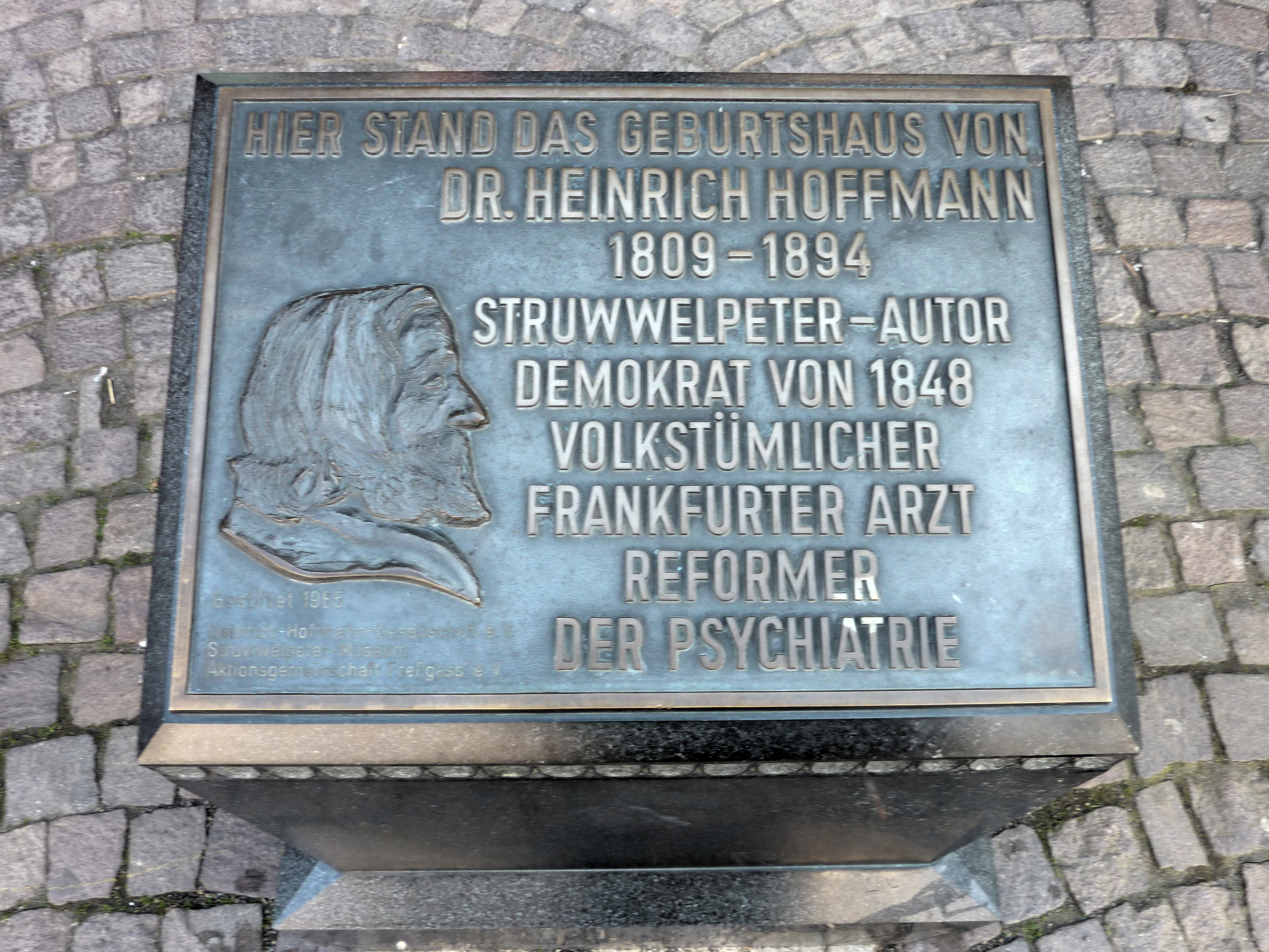 Gedenktafel (Metallguss auf Marmorstele) für das Geburtshaus des Frankfurter Arztes und Autors Heinrich Hoffmann in der Frankfurter Freßgass (unmittelbar östlich vom Säuplätzi gelegen). Inschriften (Interpunktion größtenteils selbst hinzugefügt): „Hier stand das Geburtshaus von Dr. Heinrich Hoffmann (1809–1894). Struwwelpeter-Autor, Demokrat von 1848, volkstümlicher Frankfurter Arzt, Reformer der Psychiatrie.“ „Gestiftet 1985. Heinrich-Hoffmann-Gesellschaft e. V., Struwwelpeter-Museum, Aktionsgemeinschaft Freßgass e. V.“